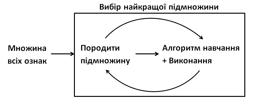 Схема вбудованого методу вибору ознак